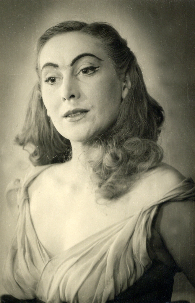 Ivan Cankar, Pohujšanje v dolini šentflorjanski, SNG za Svobodno tržaško ozemlje. Na fotografiji: Štefka Drolc (Jacinta).